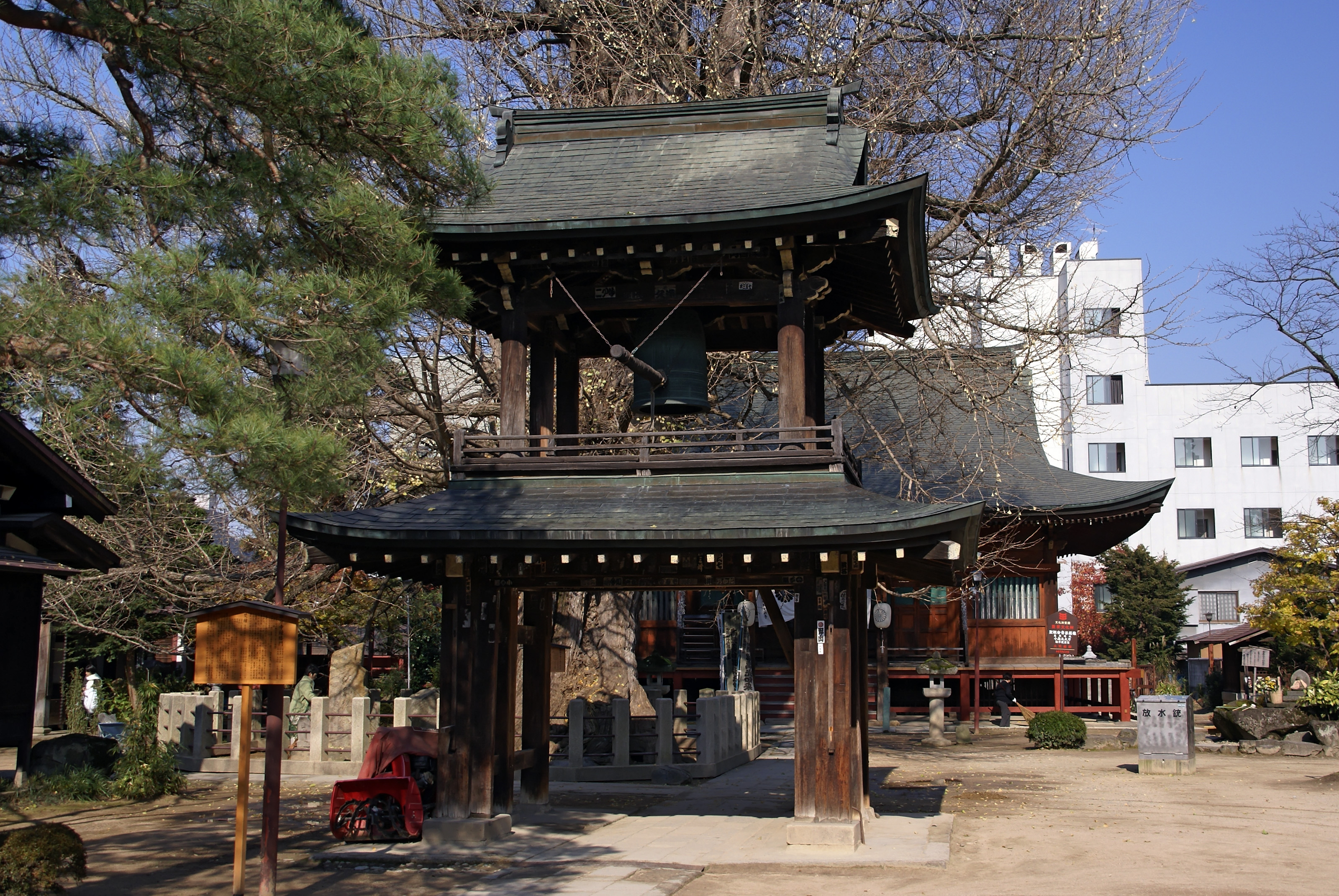 Hida-kokubunji in Takayama, Gifu prefecture, Japan